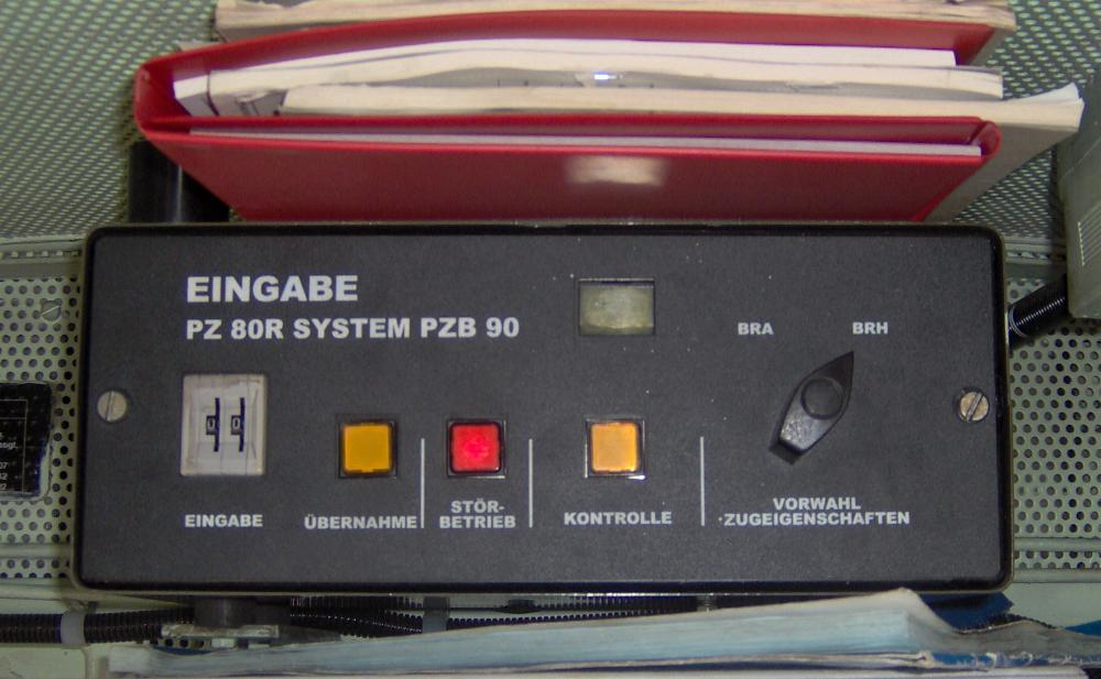 Bedieneinheit PZ80 Fabikat : Gerätewerk Treuenbrietzen GmbH Baujahr : 1992 Lok : V100-Ost